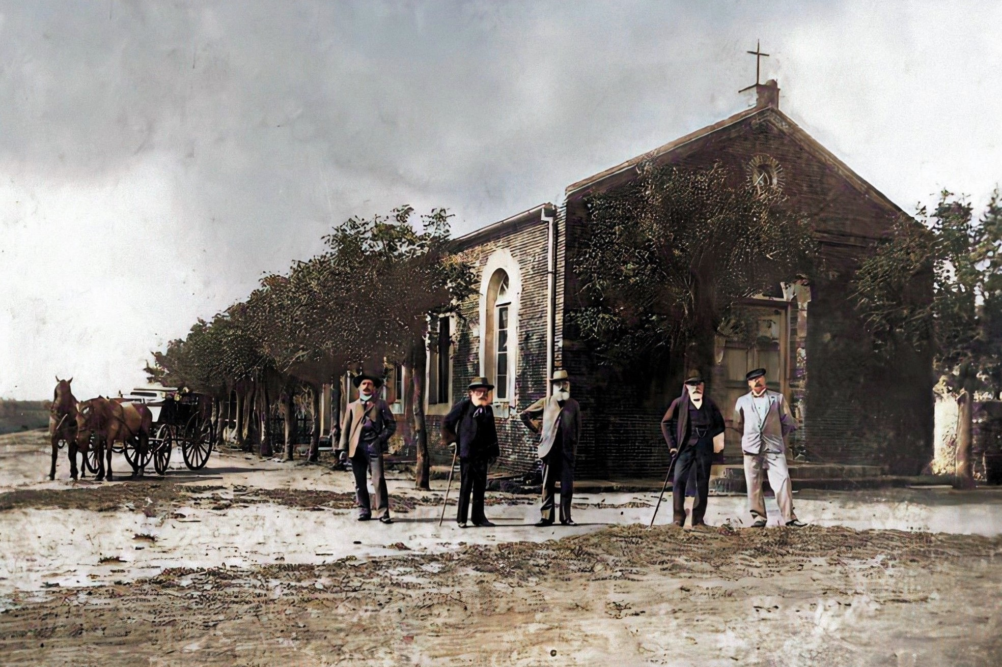 Descriptiva de la vida religiosa de los primeros pobladores